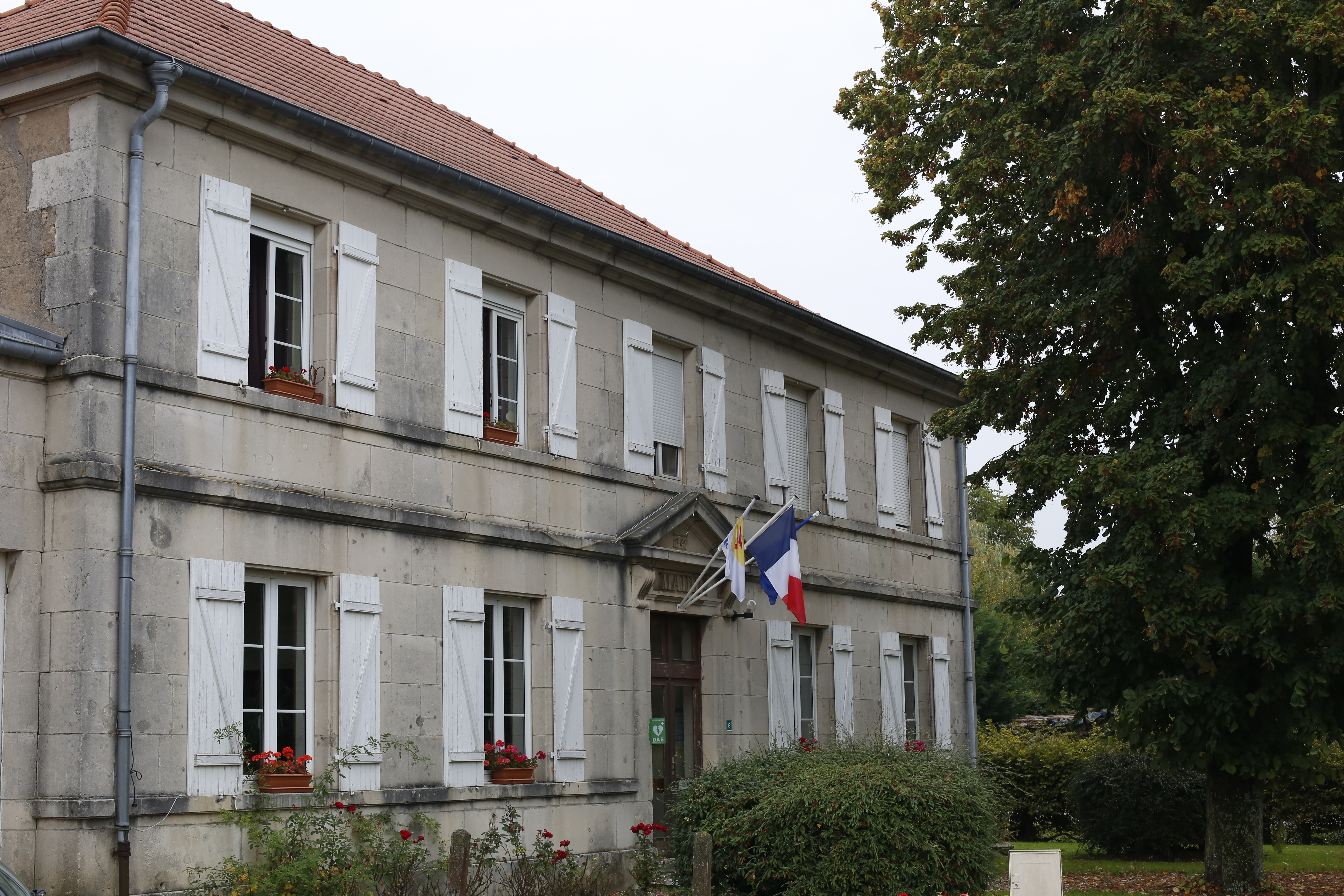 Mairie de Nonsard-Lamarche.